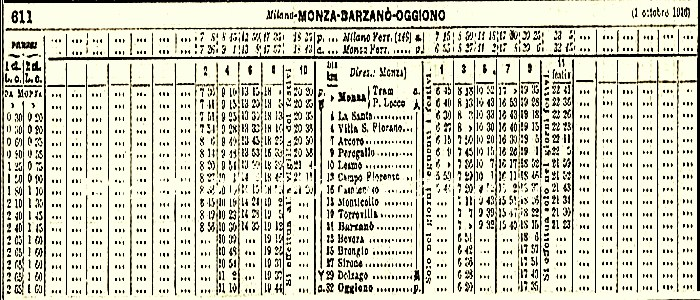 Orario tram Oggiono 1916